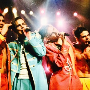 Concert AB Brussel